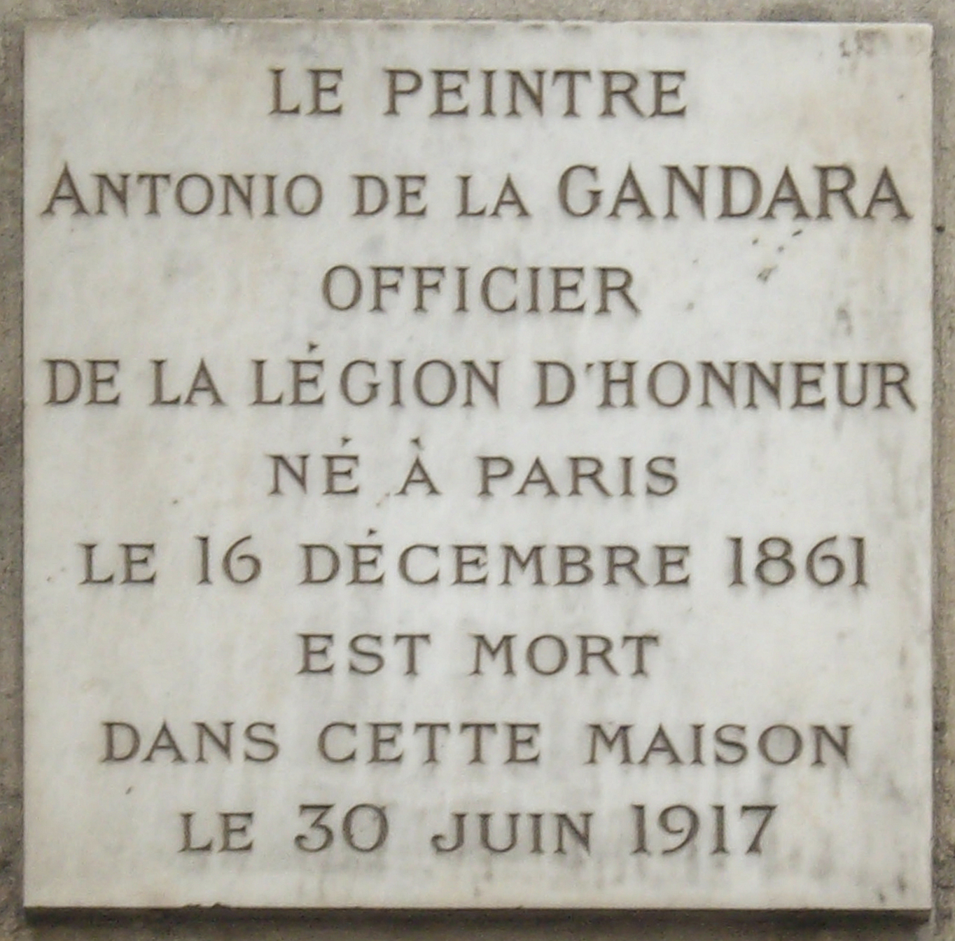 Plaque commémorative, 22 rue Monsieur-le-Prince, Paris 6e. « Le peintre Antonio de La Gandara, officier de la Légion d'honneur, né à Paris le 16 décembre 1861, est mort dans cette maison le 30 juin 1917. »